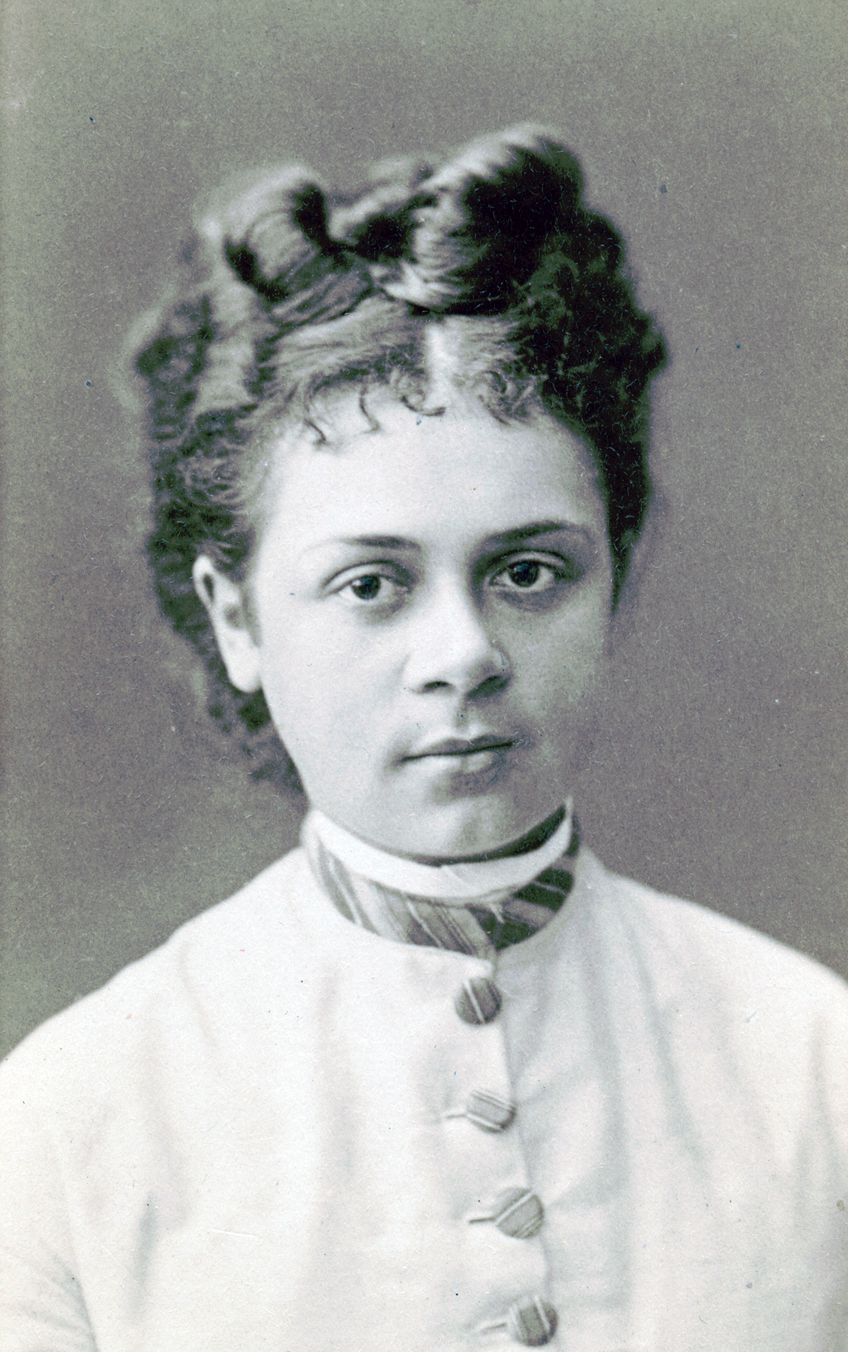 Greta Dahlqvist, skådespelare vid Kungliga teatern 1868